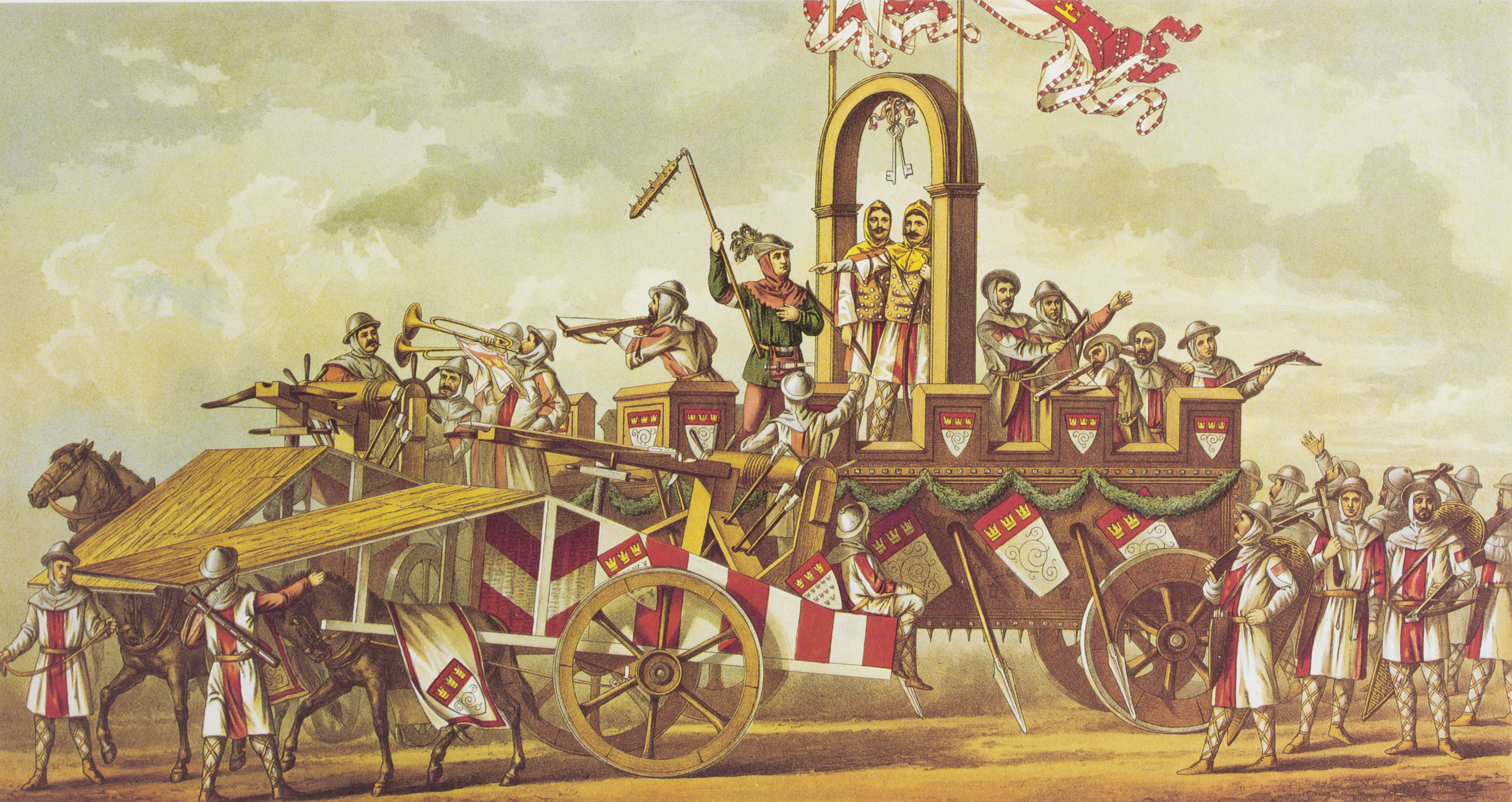 Tony Avenarius: Historischer Festzug veranstaltet bei der Feier der Vollendung des Kölner Doms am 18. October 1880. Tafel IX